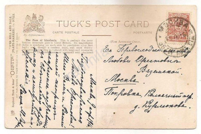 Почтовая открытка, адресованная Вяземской Любови Орестовне. 1916 год.